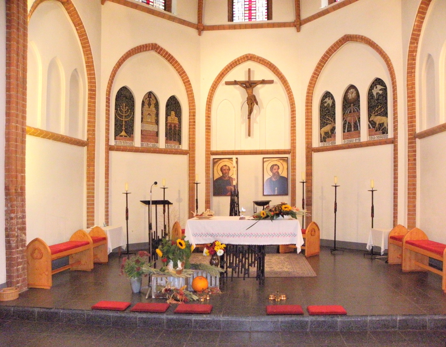 Kath. Kirche St. Peter und Paul in Eberswalde